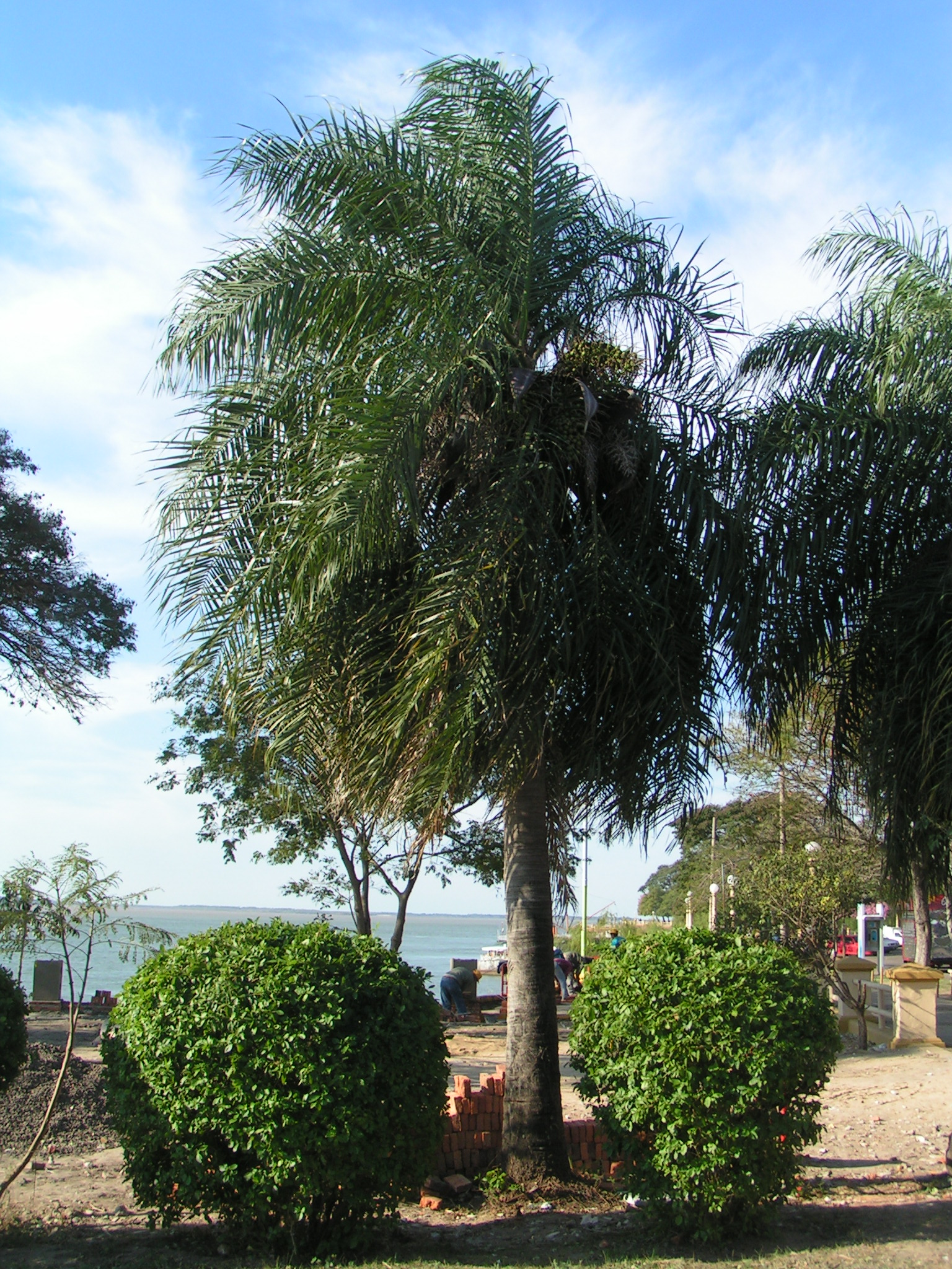 Mbokaja o mbocayá (Acrocomia aculeata, syn. A. totai)